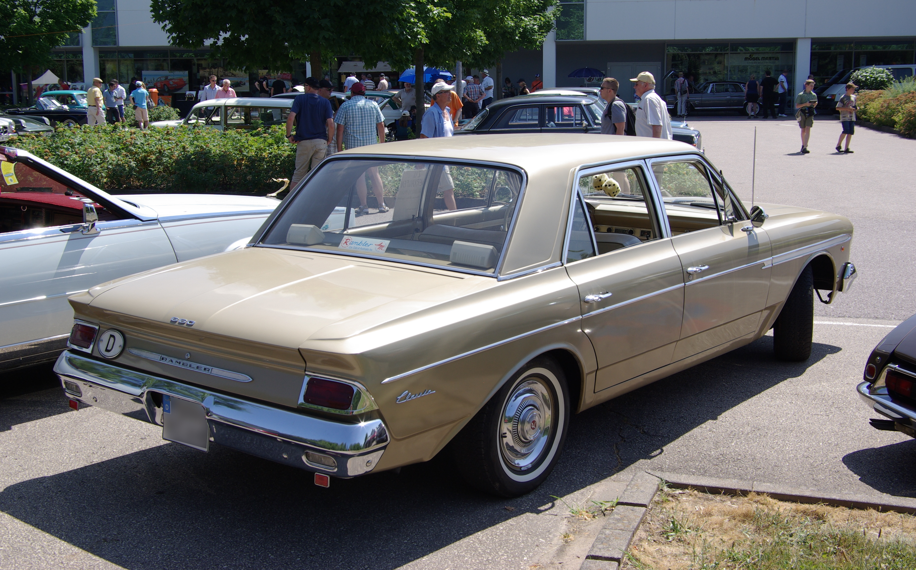 AMC Rambler, 1963, 115 PS, 29. Internationales Oldtimer Treffen Konz